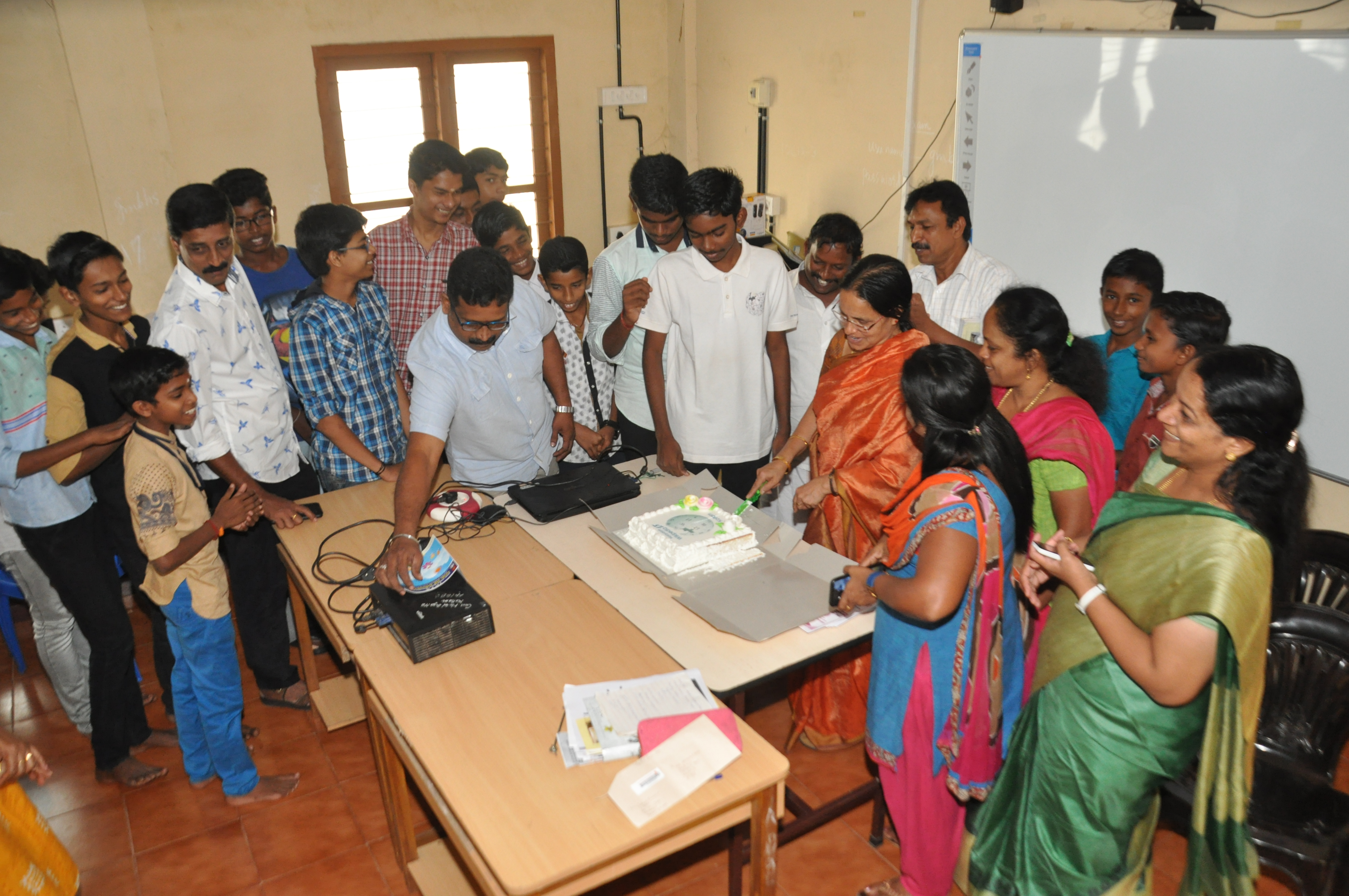 മലയാളം വിക്കിപീഡിയയുടെ പതിനഞ്ചാം പിറന്നാള്‍ ആഘോഷവും കേക്ക് മുറിക്കലും